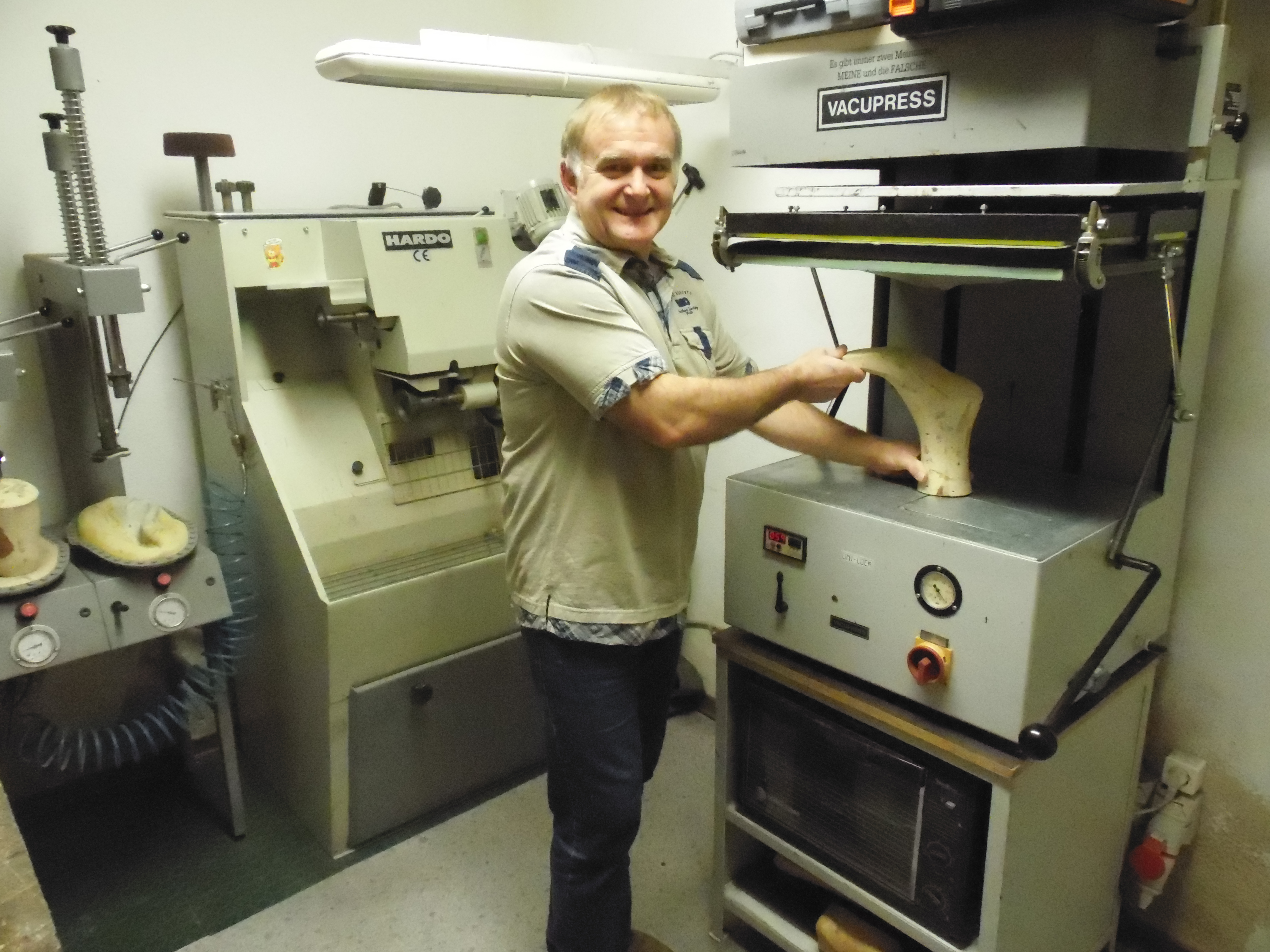 Orthopädieschuhtechniker an der Vakuumpresse